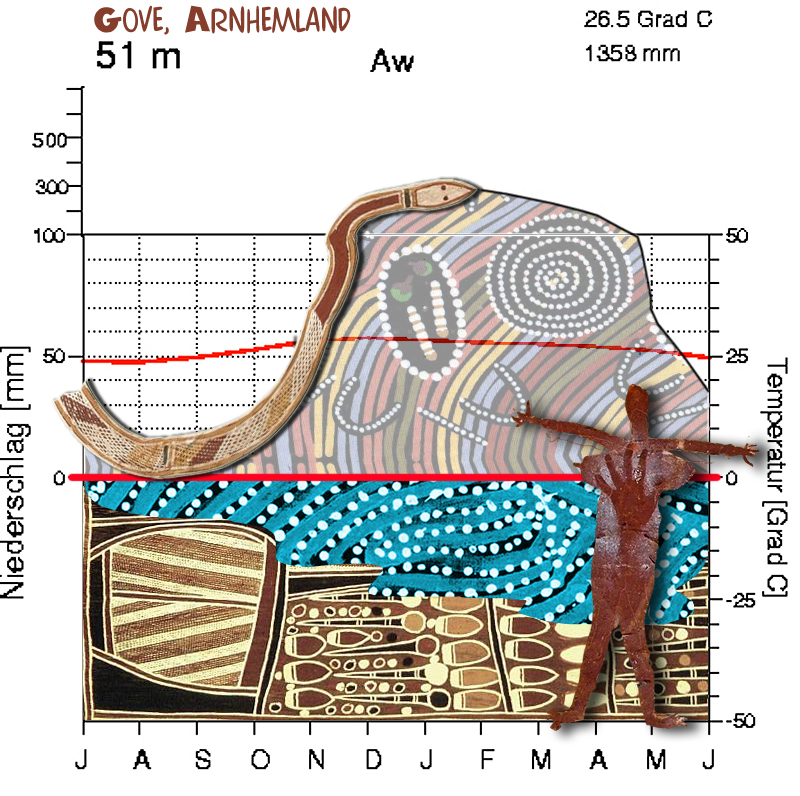 Grafik zur Verdeutlichung des Zusammenhanges vom Mythos der Regenbogenschlange und einem Klimadiagramm